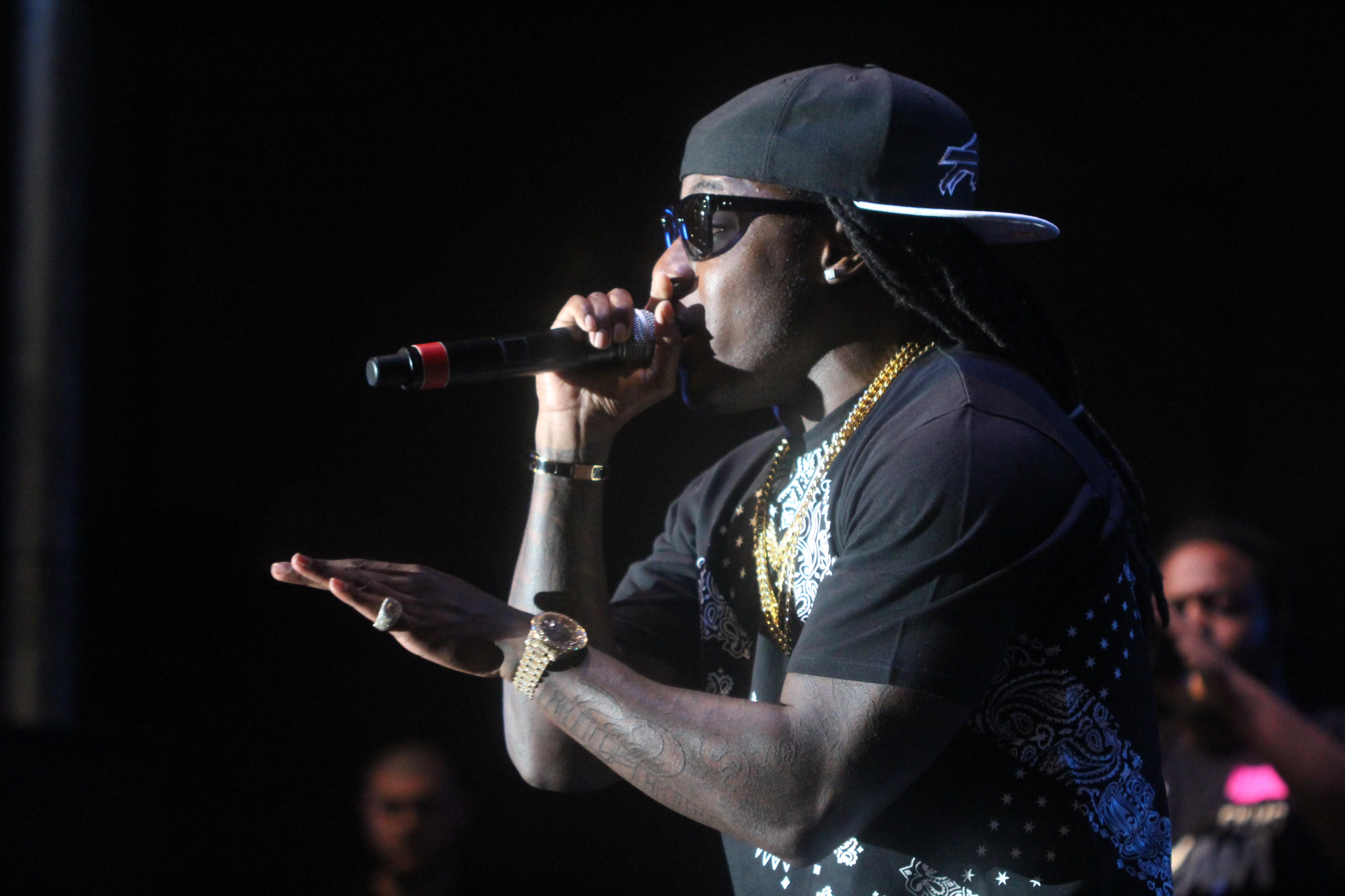 ACe Hood in 2013